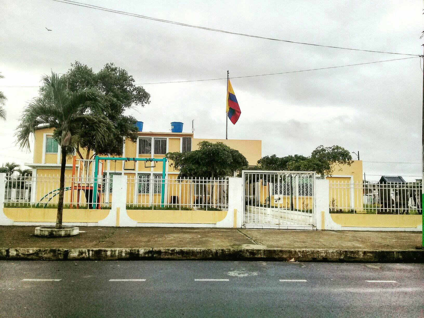 City Hall of Urdaneta.